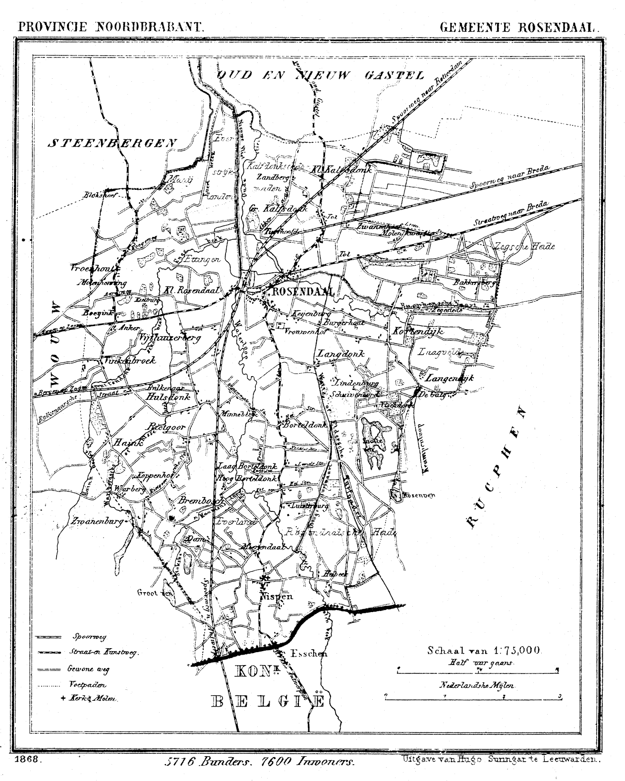 Nederland, Noord-Brabant, Gemeente Roosendaal